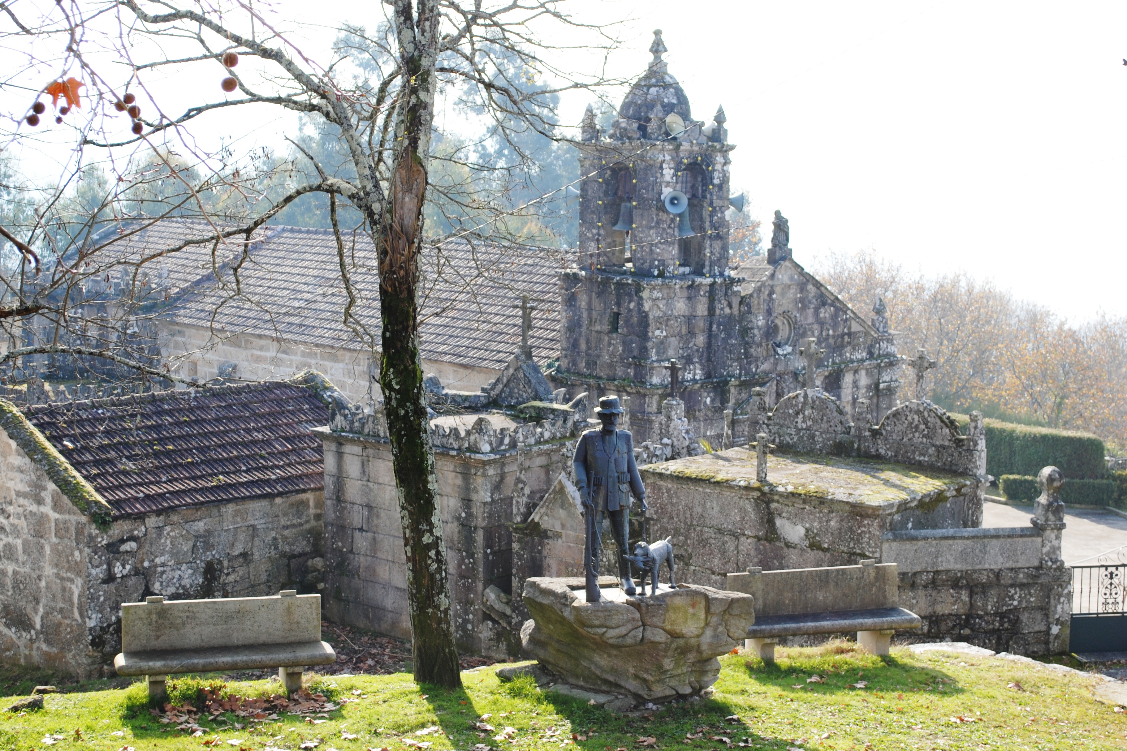 Toutón, Mondariz